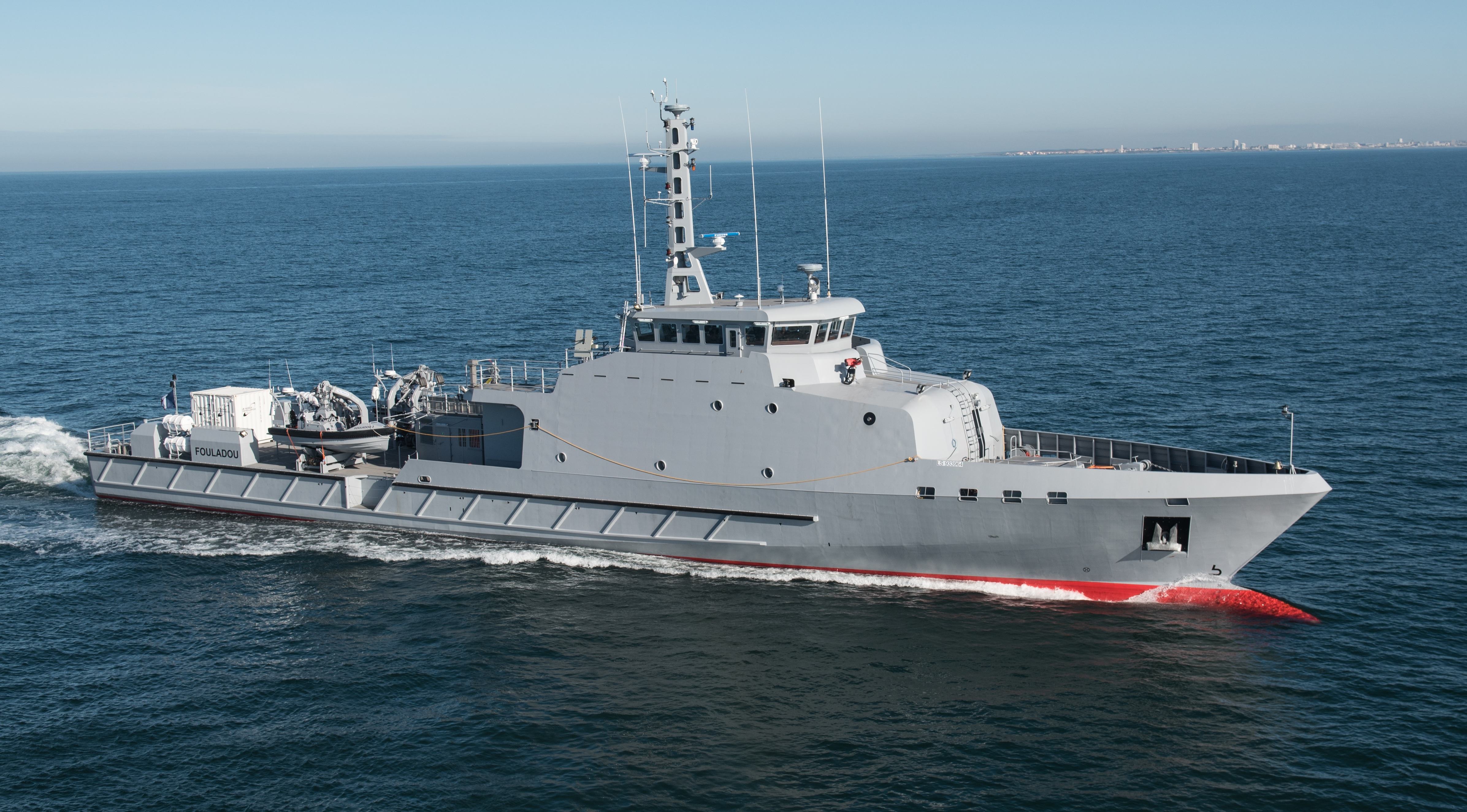 Patrouilleur hauturier sénégalais Fouladou.